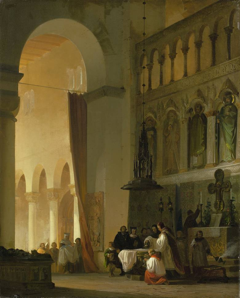 Taufe eines Kindes vor dem Seitenaltar einer Basilika. Öl auf Leinwand. 69 x 56 cm